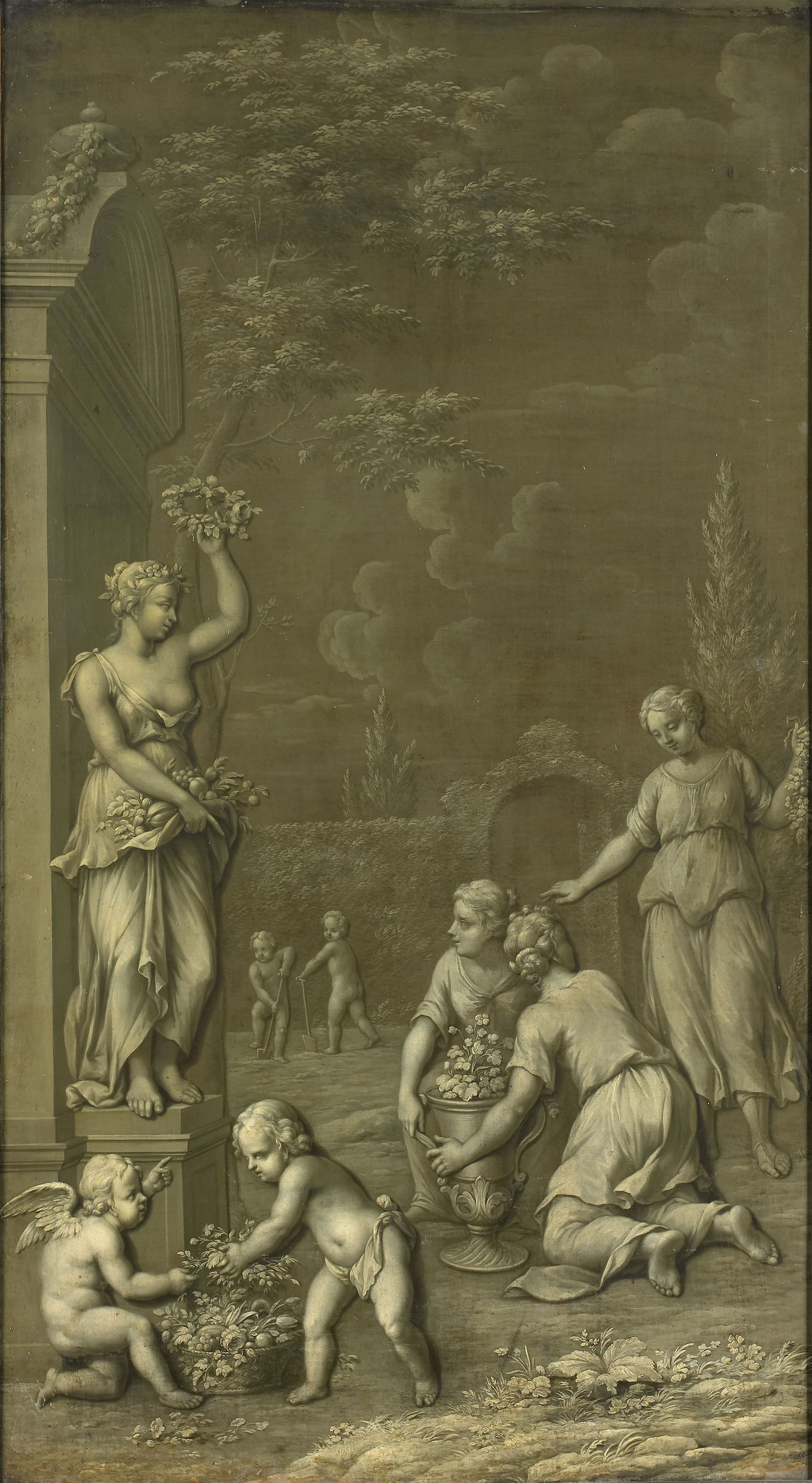 Pendant of File:Hendrik Carré (II) 001.jpg